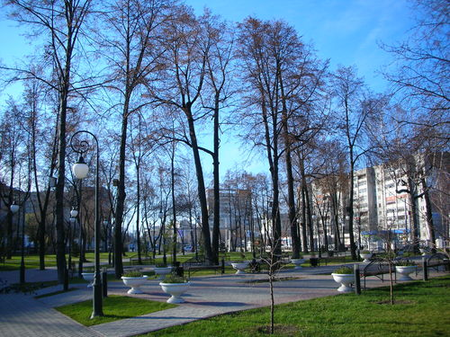 Загородный сад в Тюмени, вид на ул. Профсоюзная